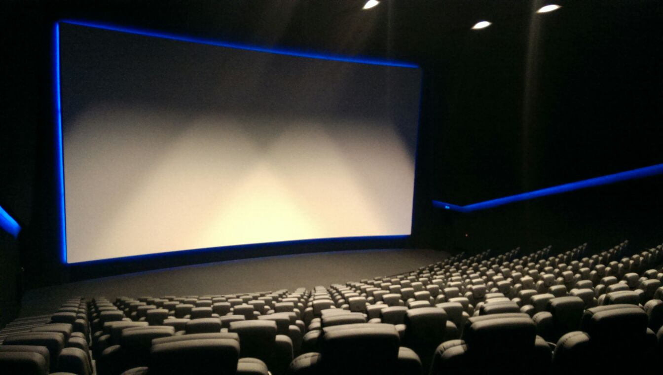 De Dolby Cinema-zaal in Vue Cinema Hilversum